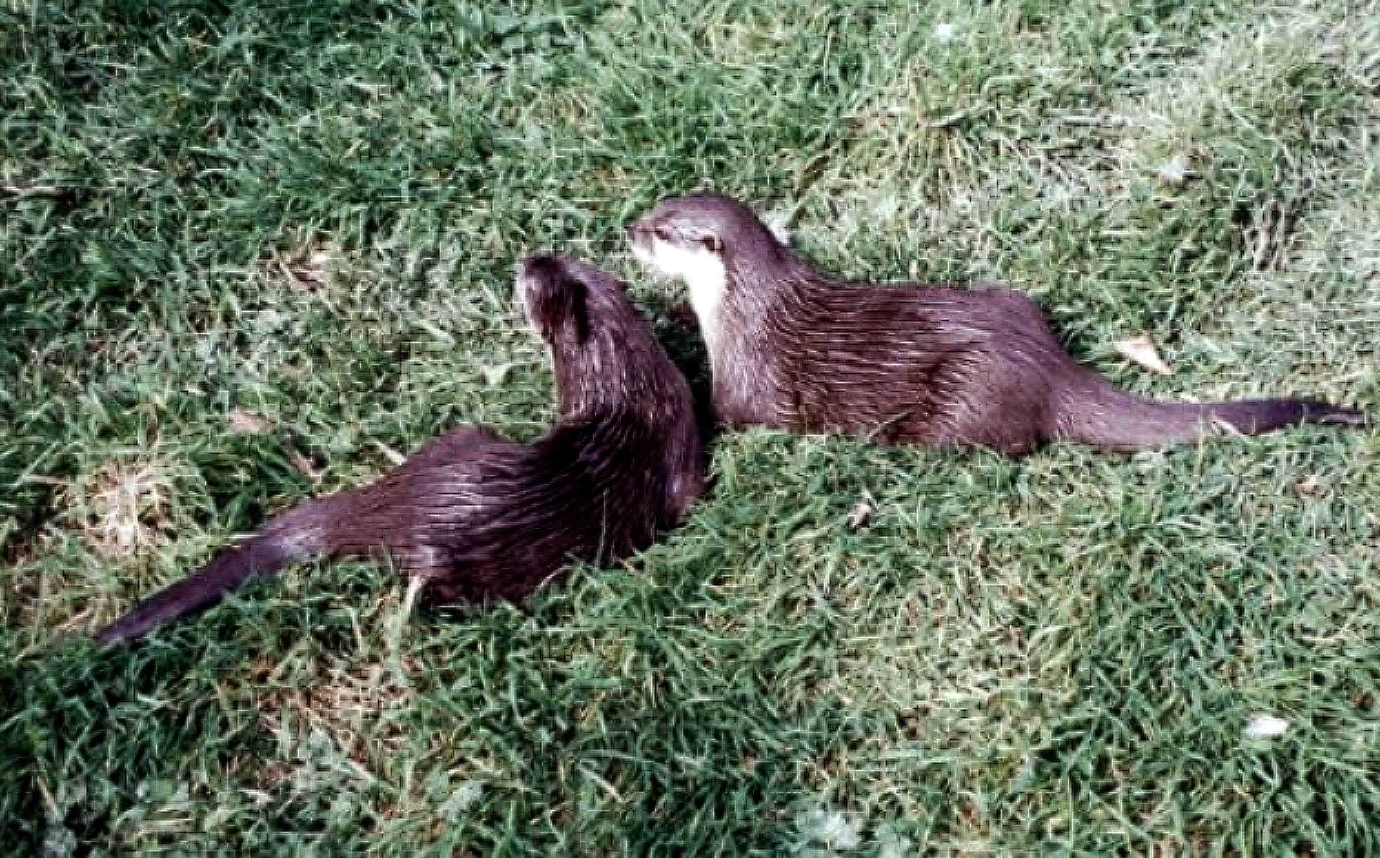 Otters at Exmoor Zoo.